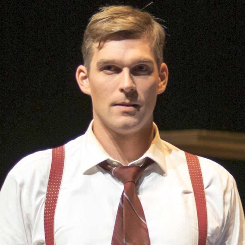 Simon Lepage au théatre de la Bordée, Québec, Canada en 2015